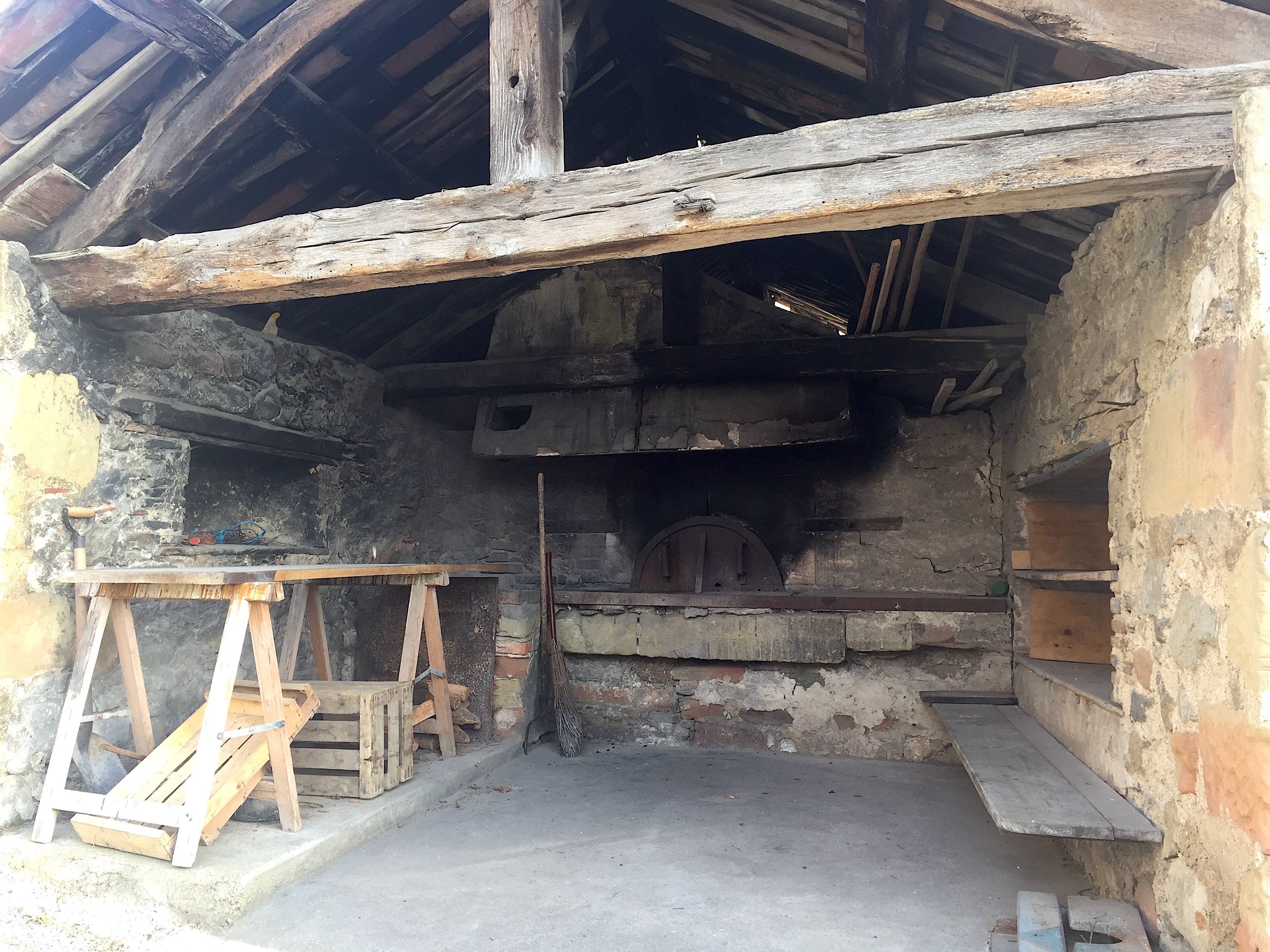 Four à pain de Hautefort, dit four Charlot Saint-Nicolas-de-Macherin (Isère) Mars 2017